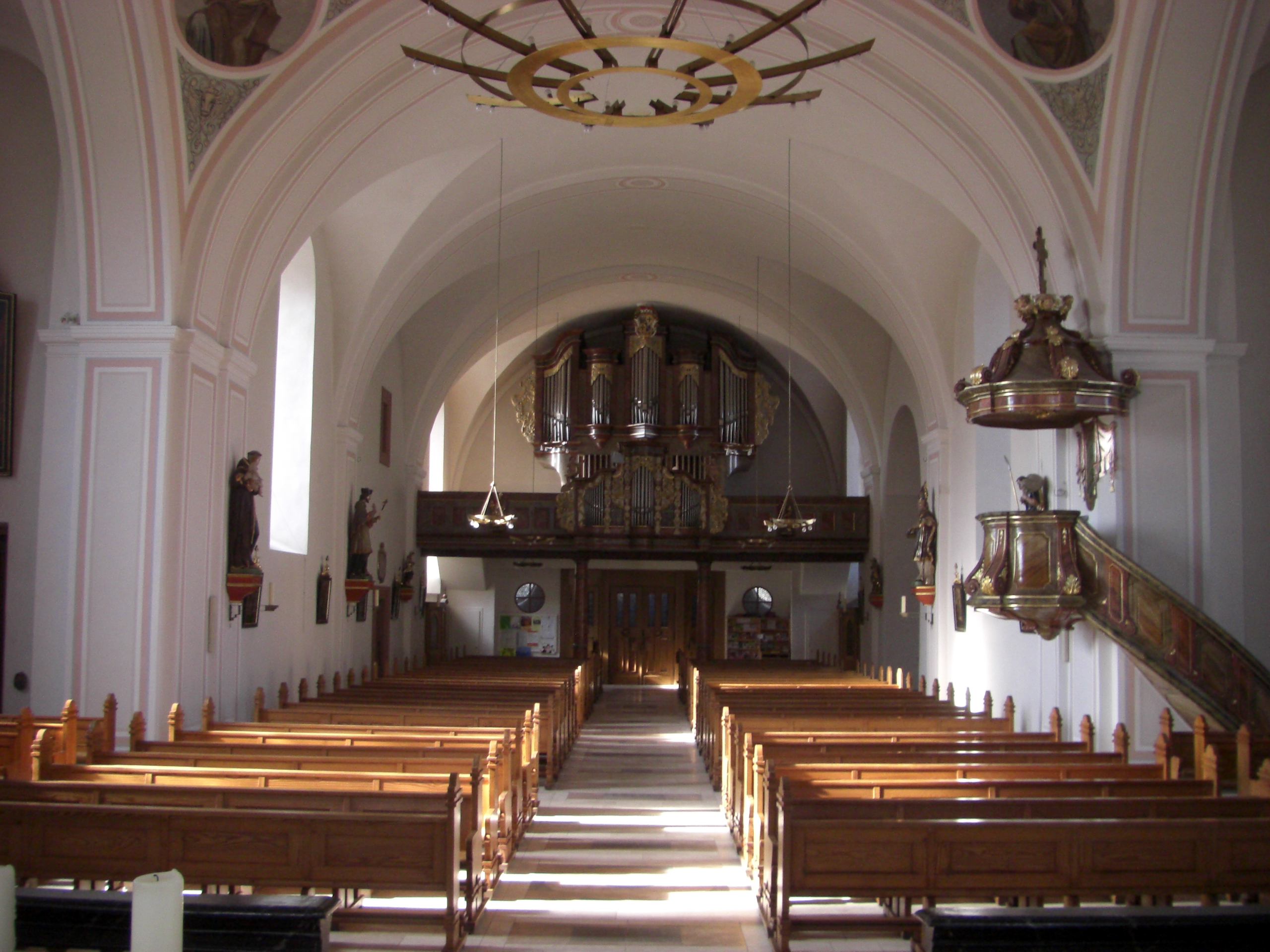 Hauptschiff mit Orgel von St. Goar (Flieden)